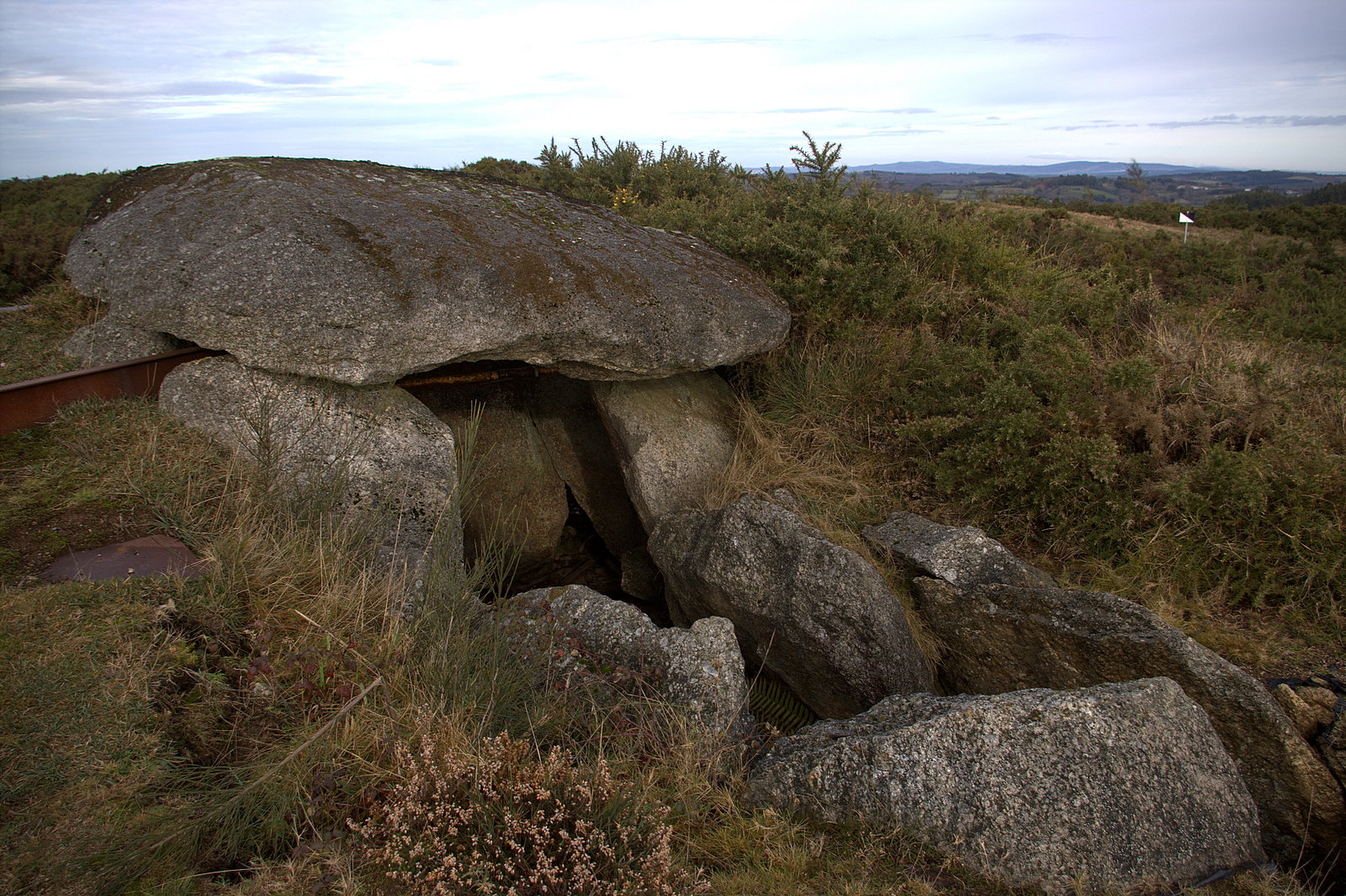 O Dolmen do Forno dos Mouros atópase na serra do Bocelo, parroquia de Paradela, Concello de Toques, provincia de A Coruña. Atopáronse pinturas rupestres na sua cámara interior.